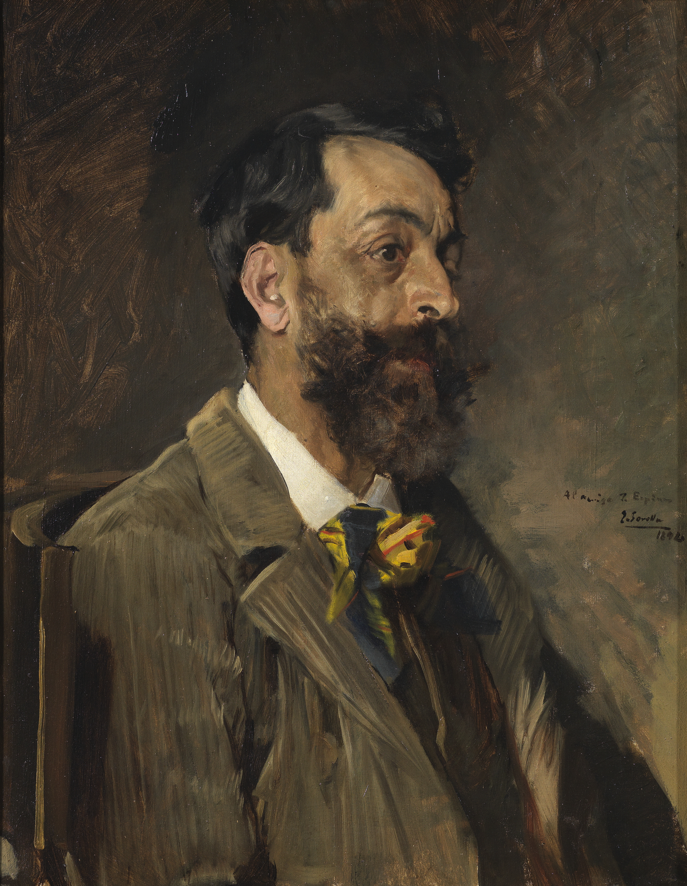 Portrait of Juan Espina y Capo